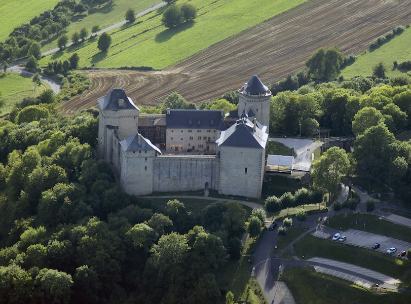 Le château de Malbrouck